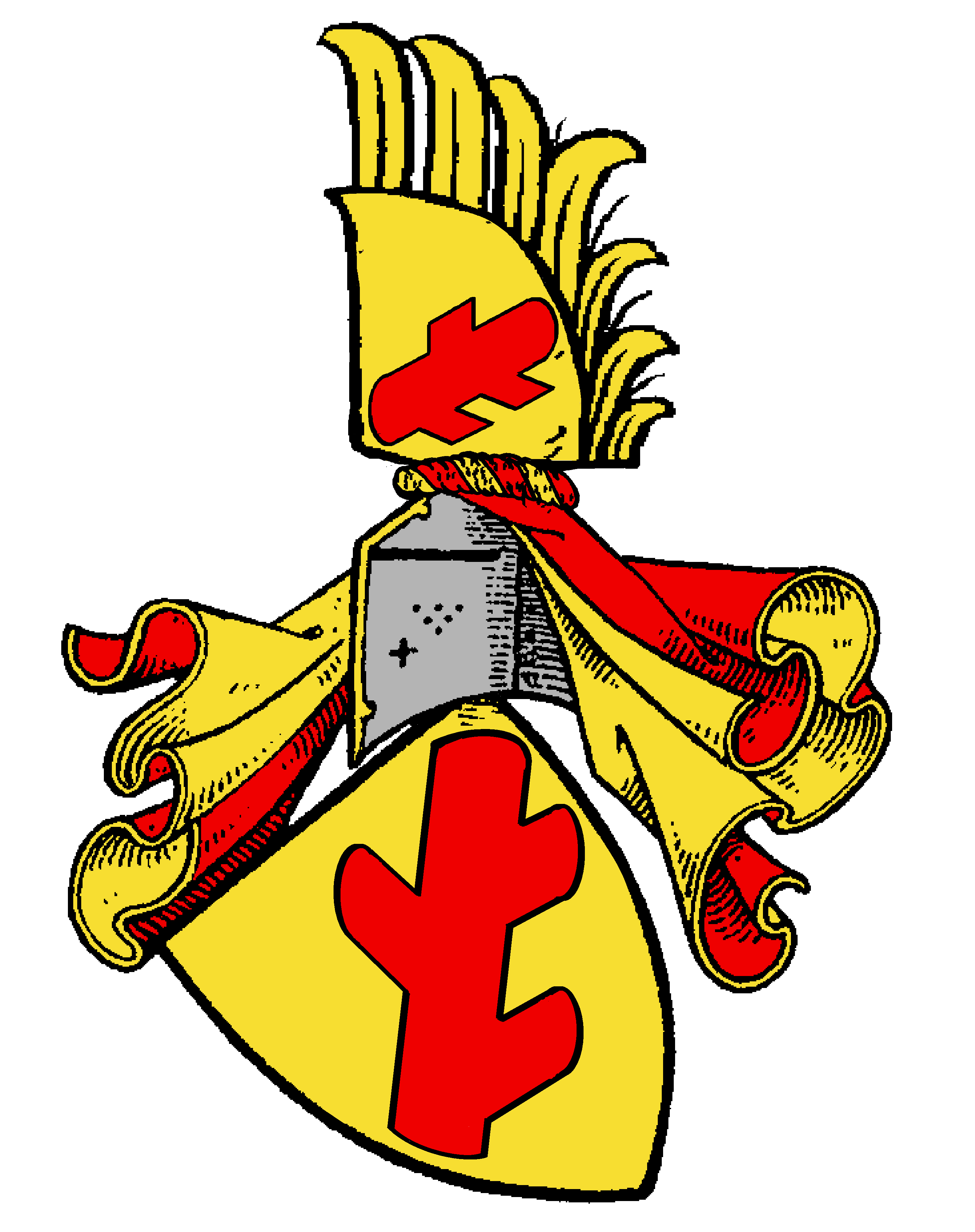 Stammwappen der Seherr (ursprgl. "Zerin"; dann auch "Seherr von Thoß"; darauf "von Seherr-Thoß")